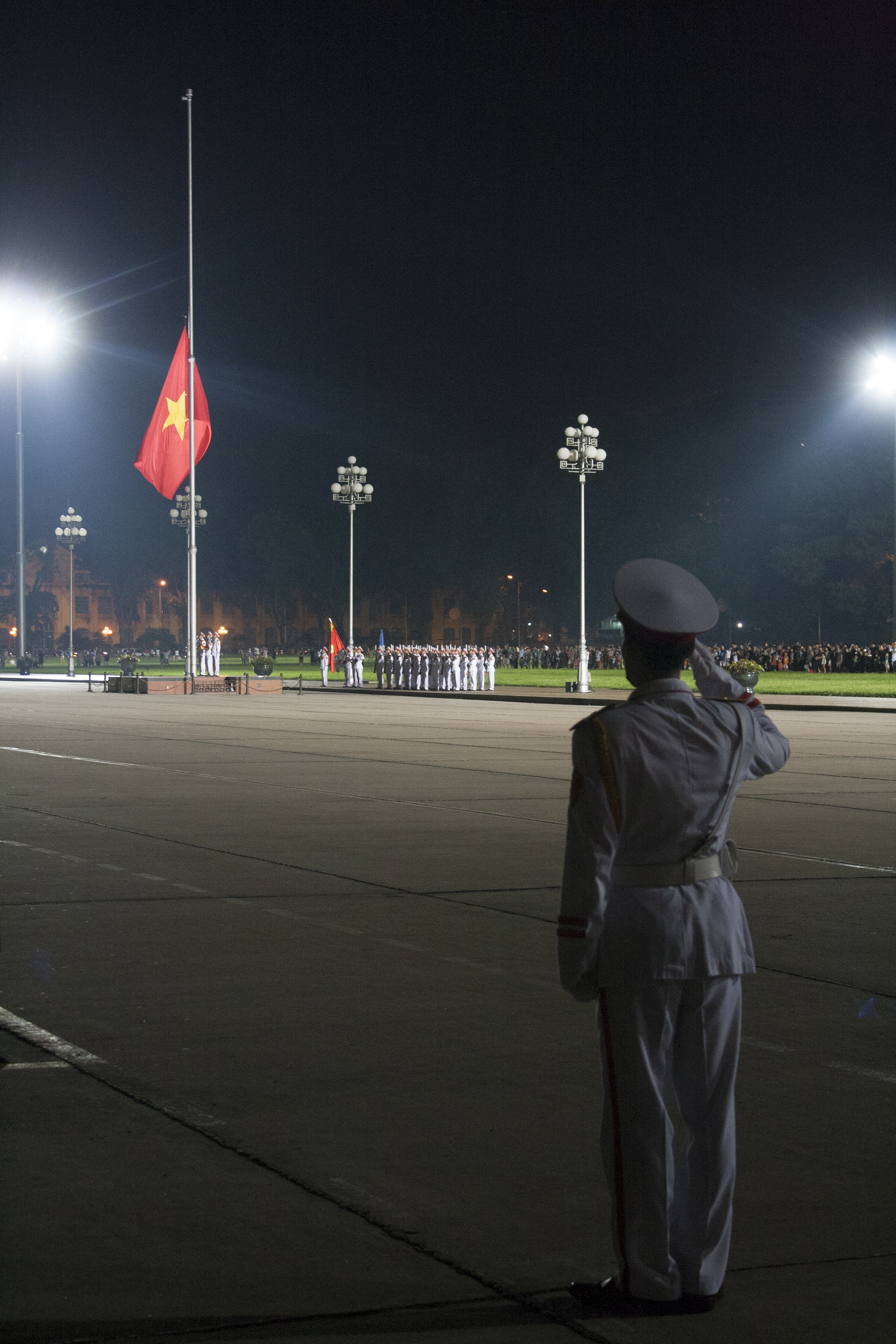 Một người lính đứng nghiêm chào lá cờ đang được hạ xuống trong lễ hạ cờ tại quảng trường Ba Đình, Hà Nội.